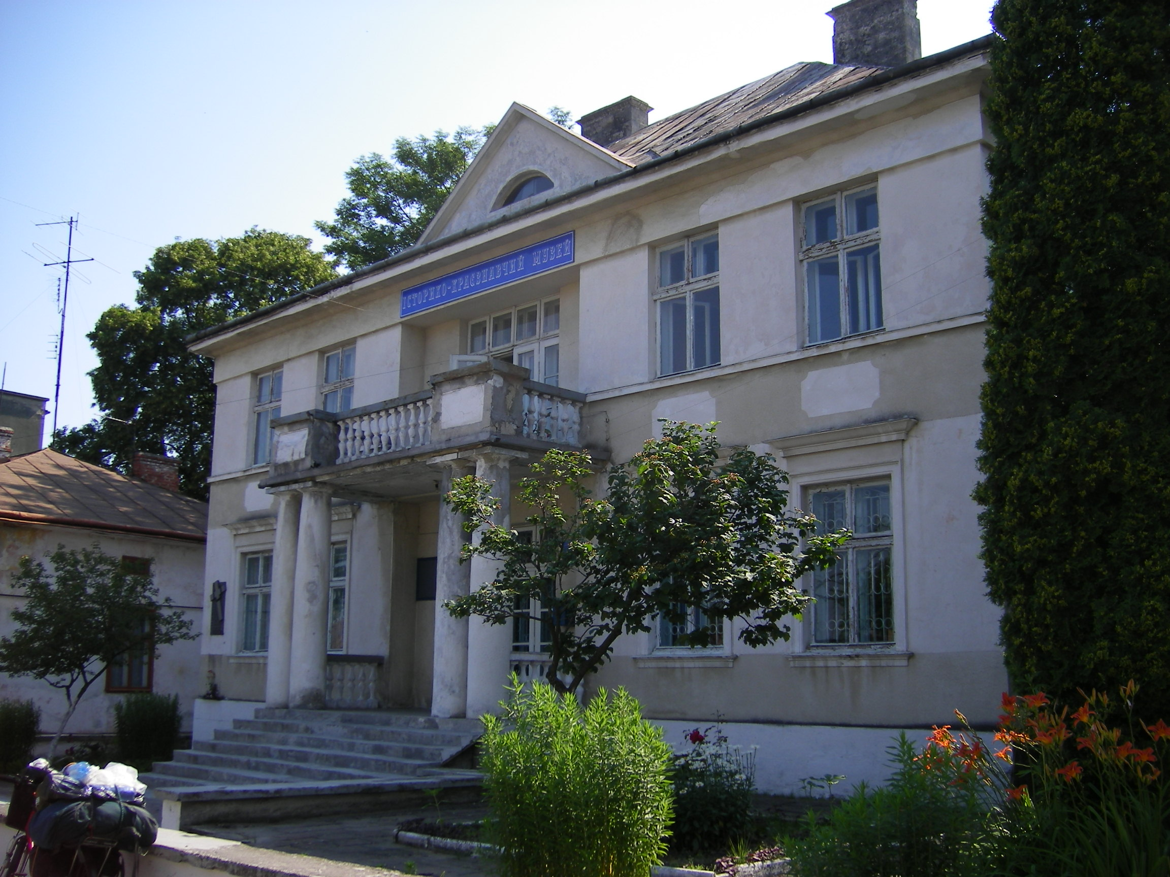 Boryslav, Museum